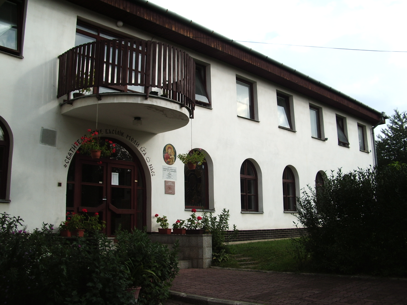 Pohľad na monastier z nádvoria. Photo taken by Jozafát Vladimír Timkovič, OSBM